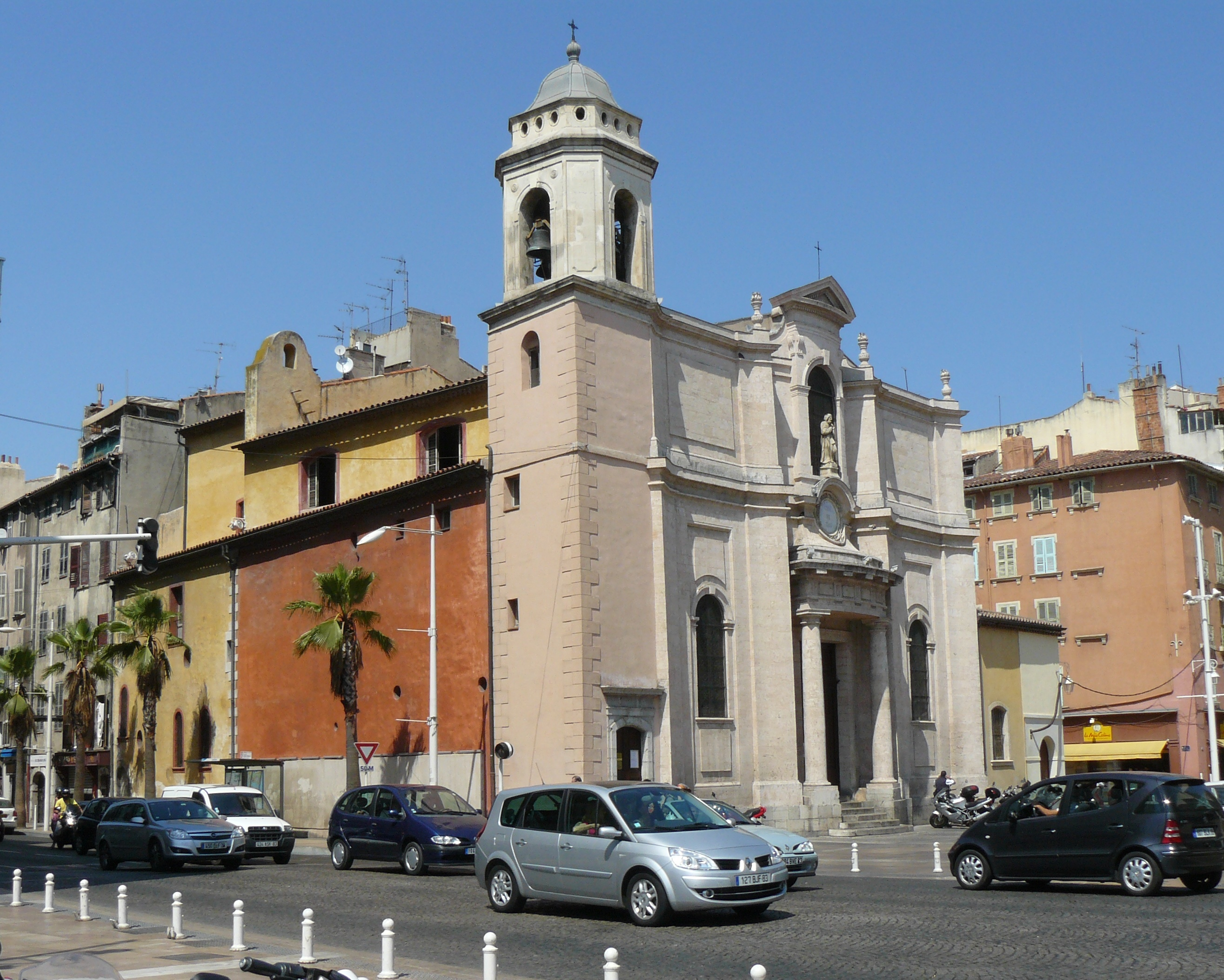 église Saint-François à Toulon, place Louis-Blanc